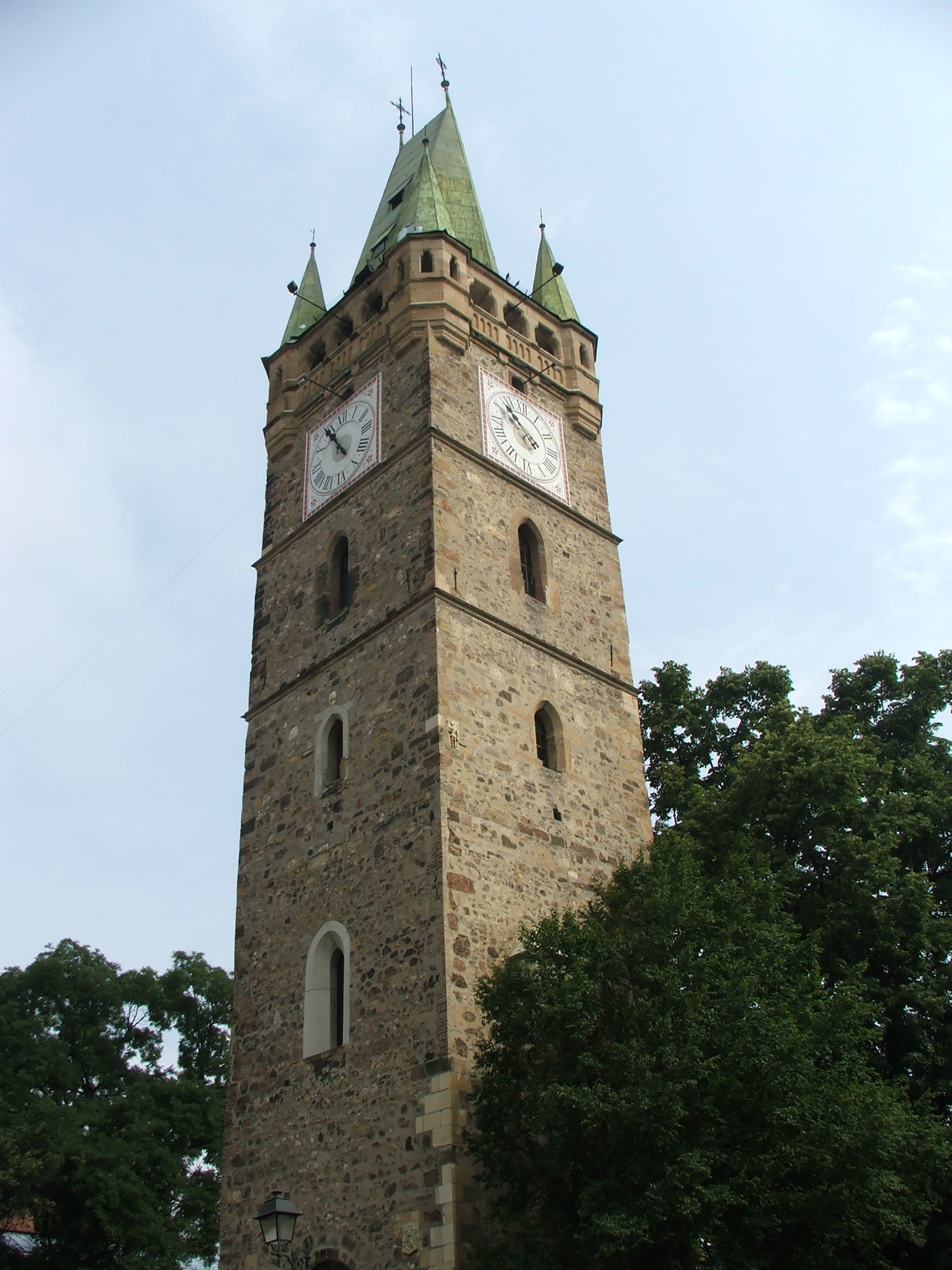 Nagybánya, Szent István-torony (Máramaros megye, Erdély)